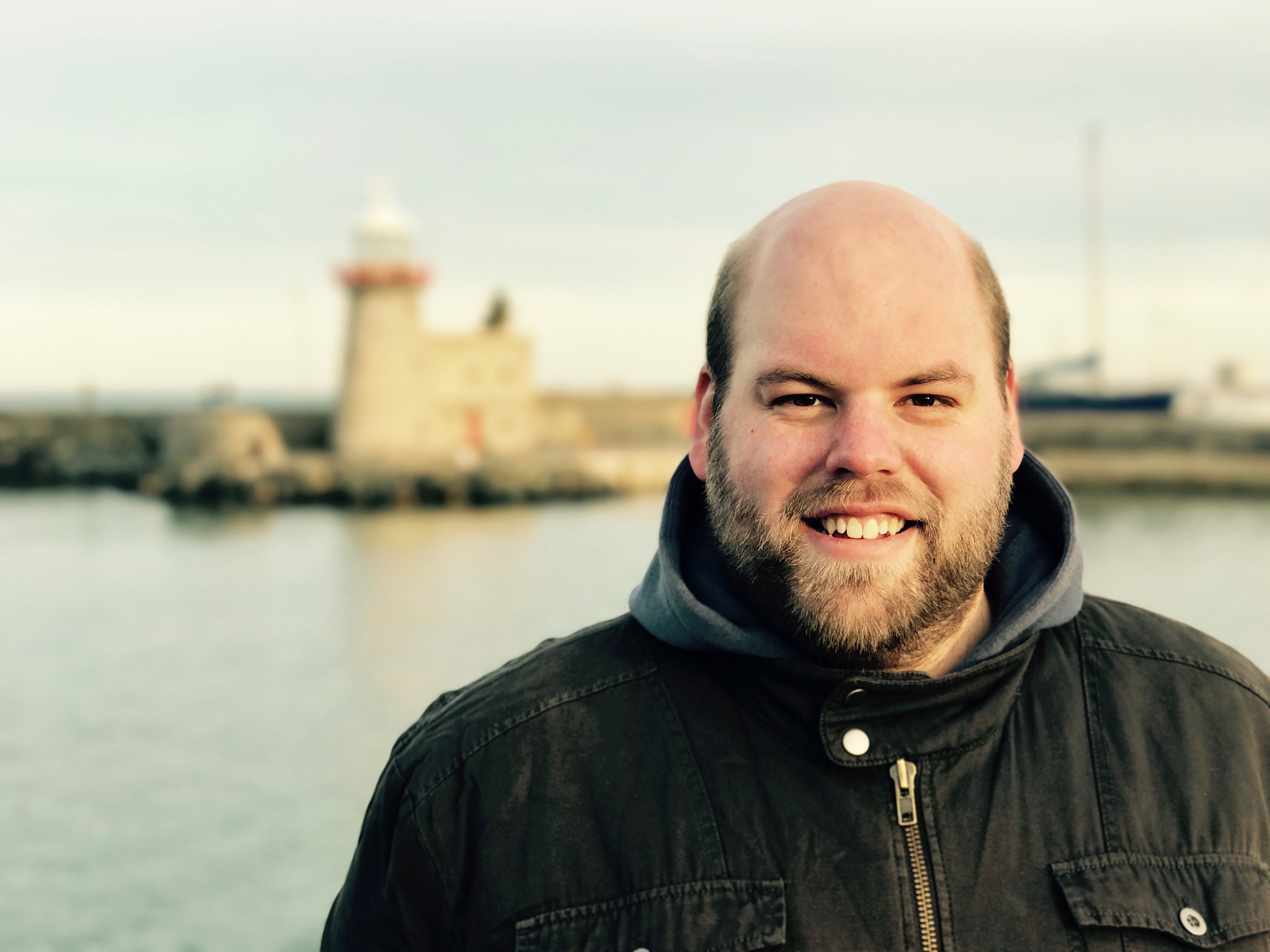 Sebastian Schack, 2016 in Howth bei Dublin, Irland.